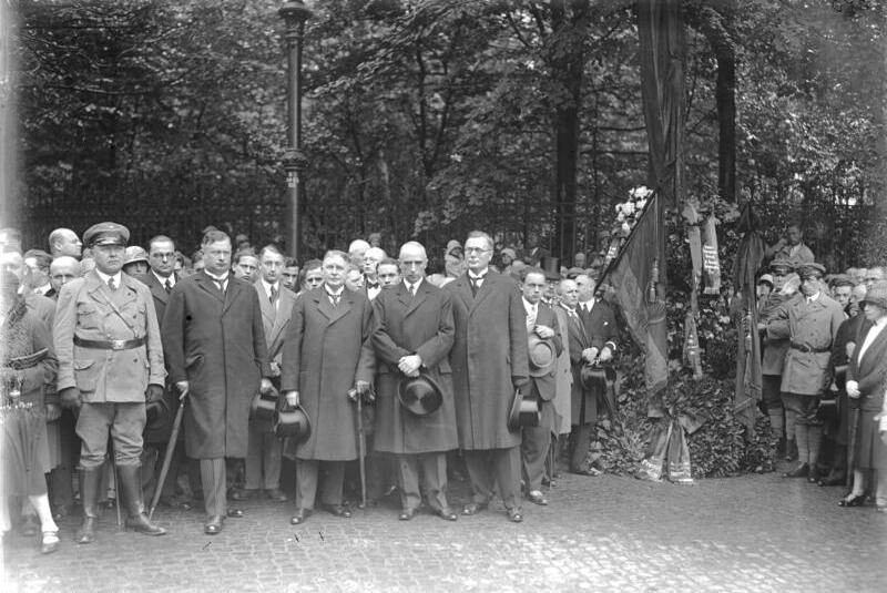 Die feierliche Enthüllung der Gedenktafel für Dr. Walter Rathenau in der Königsallee in Berlin-Grunewald. Anwesend waren der Reichswehrminister Groener, Reichskanzler a.D. Dr.Wirth und viele Freunde Rathenaus. Die Gedenktafel Dr. Walter Rathenau`s an der Mordstelle in der Königsallee in Berlin-Grunewald blumenbekränzt nach der Enthüllung. Im Vordergrund Reichskanzler a.D. Dr. Wirth (x) und Reichswehrminister Groener (xx).